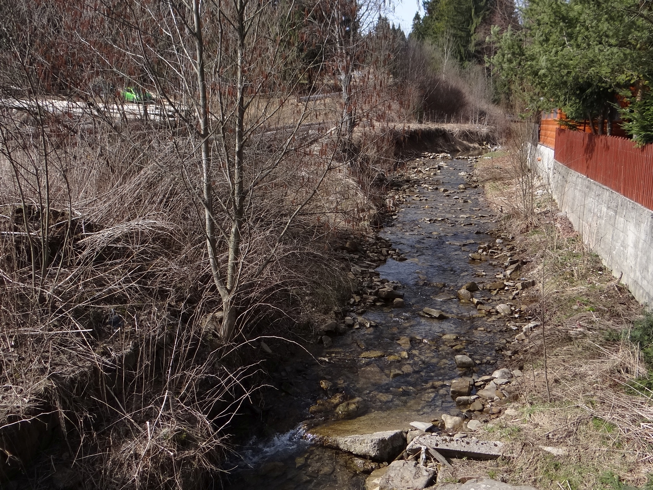 Magurski Potok przy szosie przed ujściem do Czarnego Dunajca